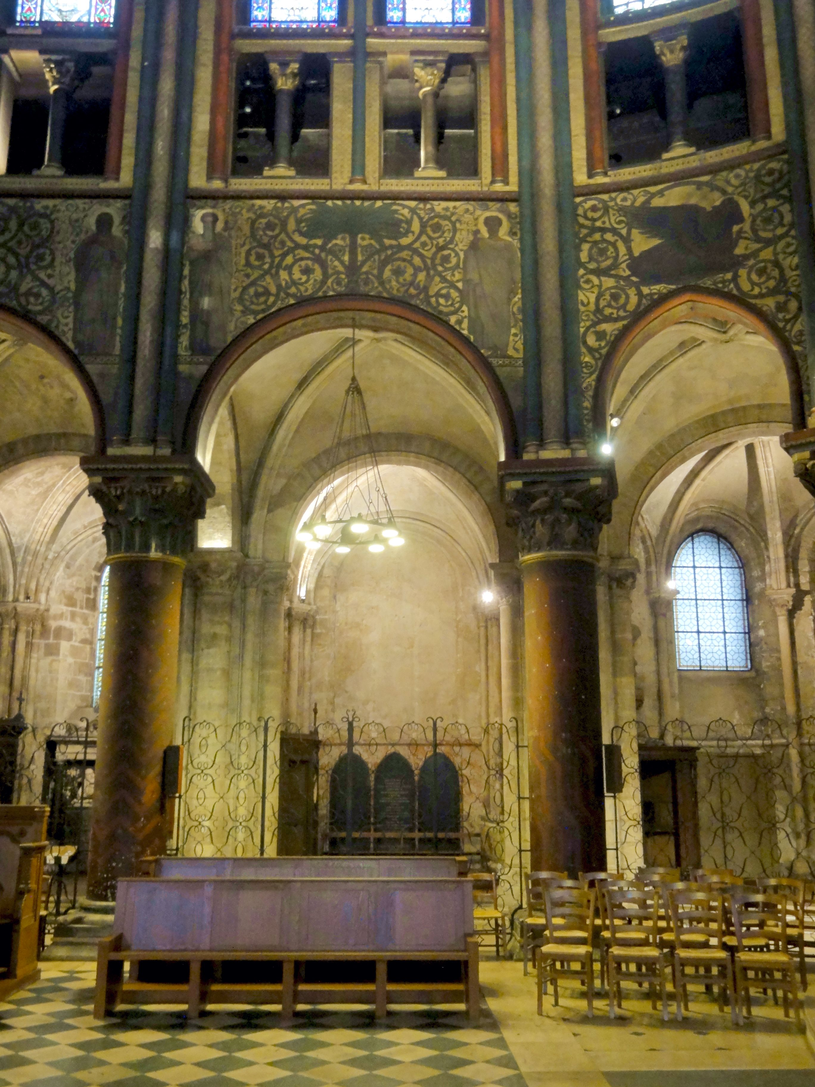 Chœur, 3e grande arcade du nord.